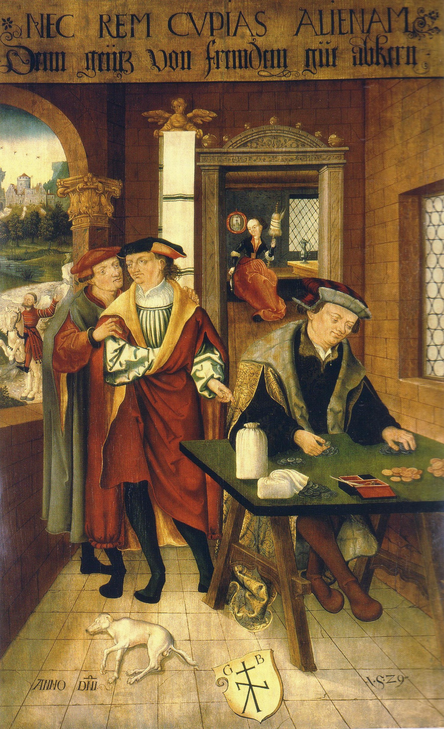 Bildertafel aus dem Zyklus der 10 Gebote (10. Gebot, 1529)